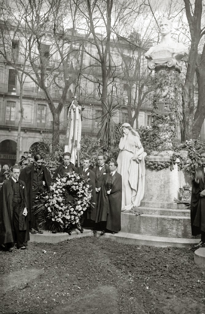 Título original: Acto de homenaje de la tuna a Usandizaga en la plaza de Gipuzkoa (1/2) Localización: San Sebastián (Guipúzcoa)